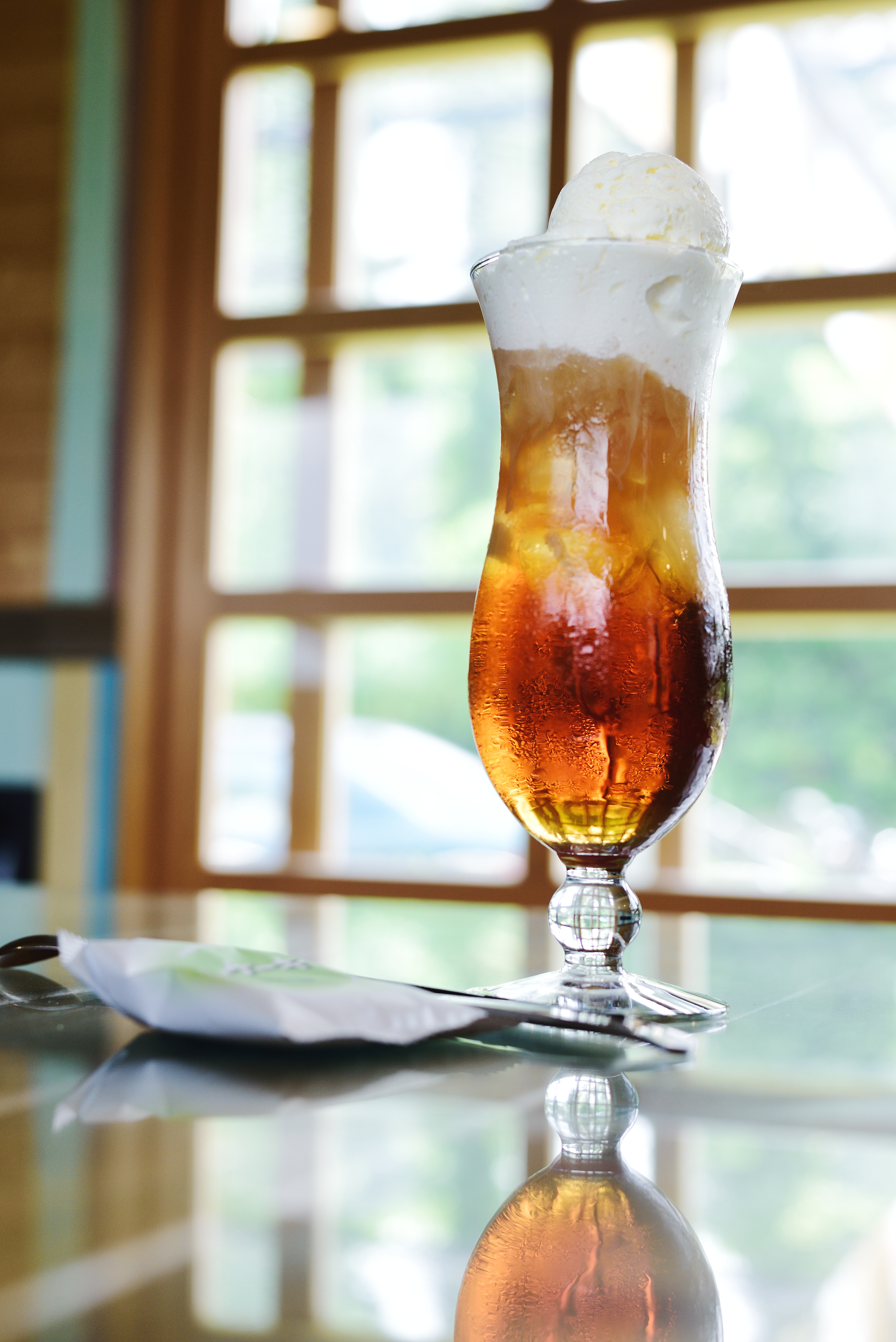 36-雲山水旁花田小路